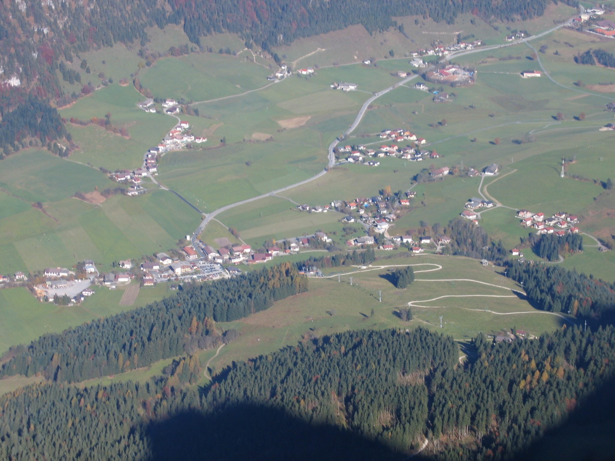 Durchholzen aufgenommen vom Zahmen Kaiser